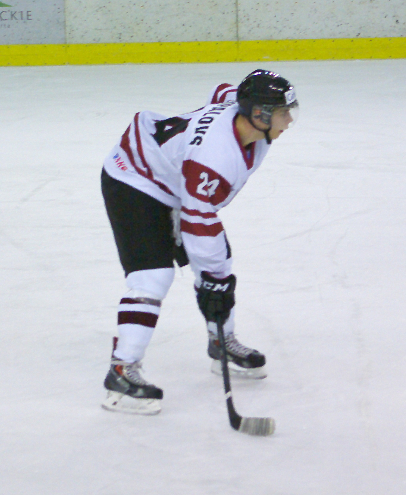 Ņikita Jevpalovs podczas Mistrzostw Świata Juniorów w Hokeju na Lodzie 2014 I Dywizji w Sanoku, Dania - Łotwa 4:1, Arena Sanok 19 grudnia 2013